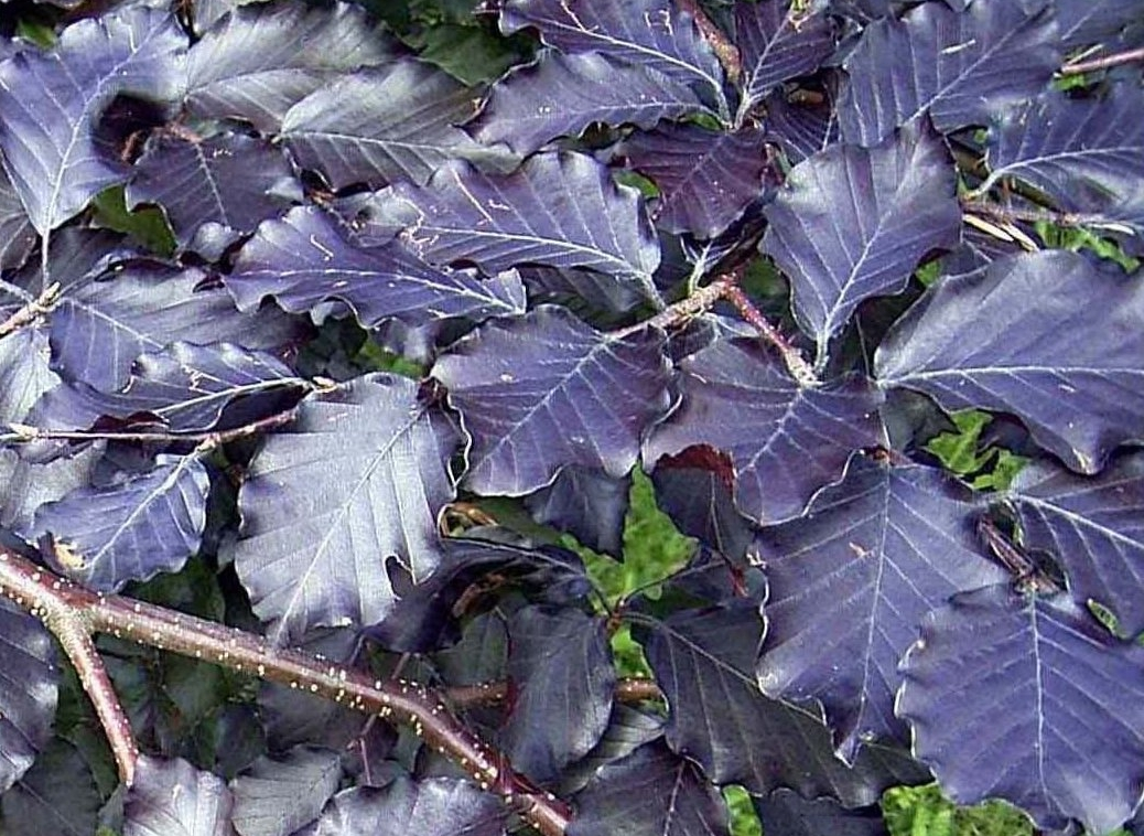 Fagus sylvatica 'Purpurea' in Bad Nenndorf, Deutschland